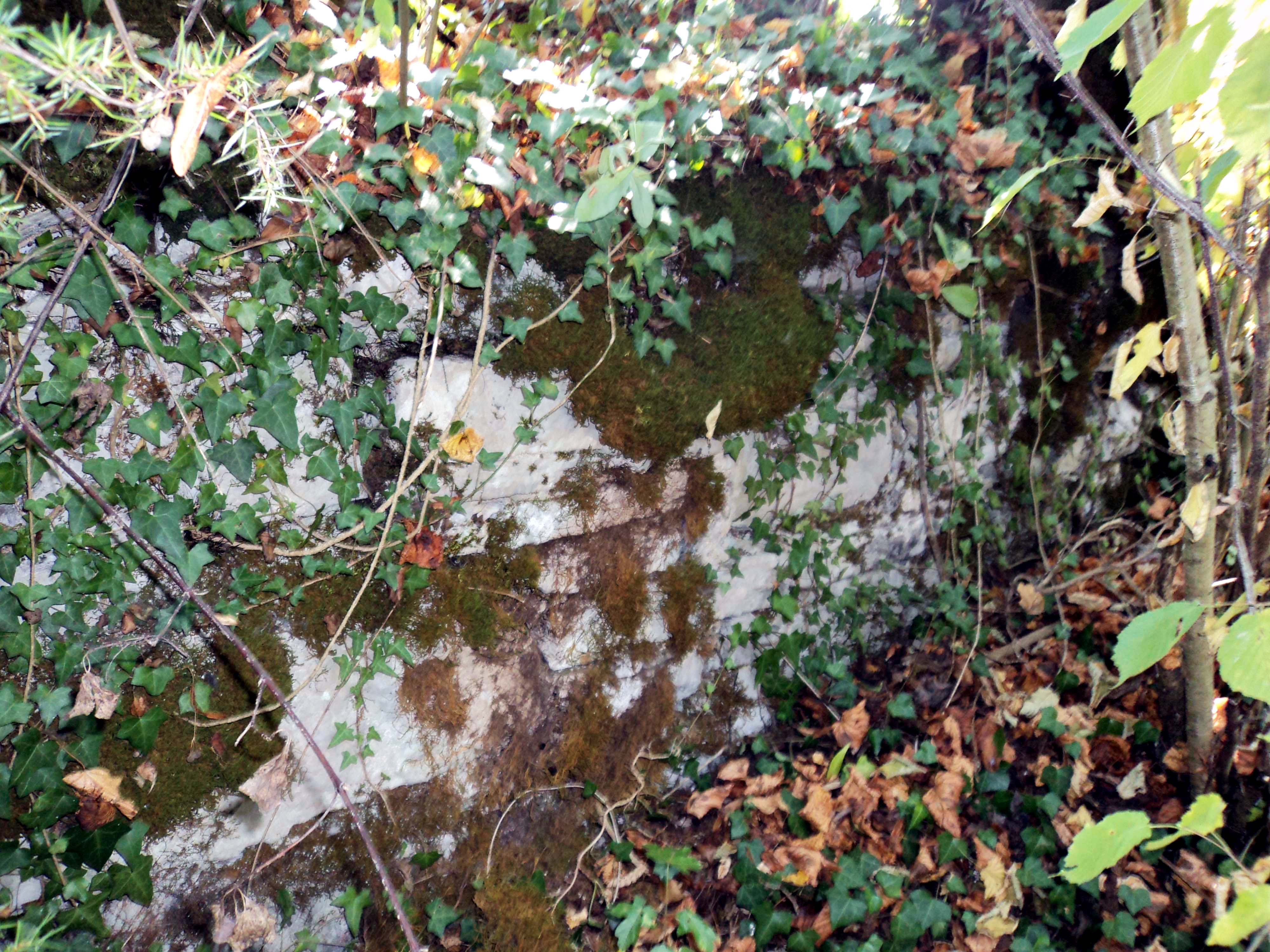 Ostanki Kovačigrajskega gradu leta 2010